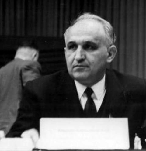 Zentralbild Kollektiv 15.1.1963 VI. Parteitag der SED vom 15.-21.1.1963 in der Werner-Seelenbinder-Halle in Berlin (1.Tag). UBz: Im Präsidium (v.l.n.r.): das Mitglied des Politbüros des ZK der SED, Herbert Warnke und der Erste Sekretär des ZK der Bulgarischen Kommunistischen Partei, Todor Shiwkow. (Schaar)